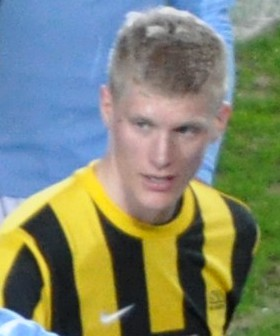 Tom Söderberg